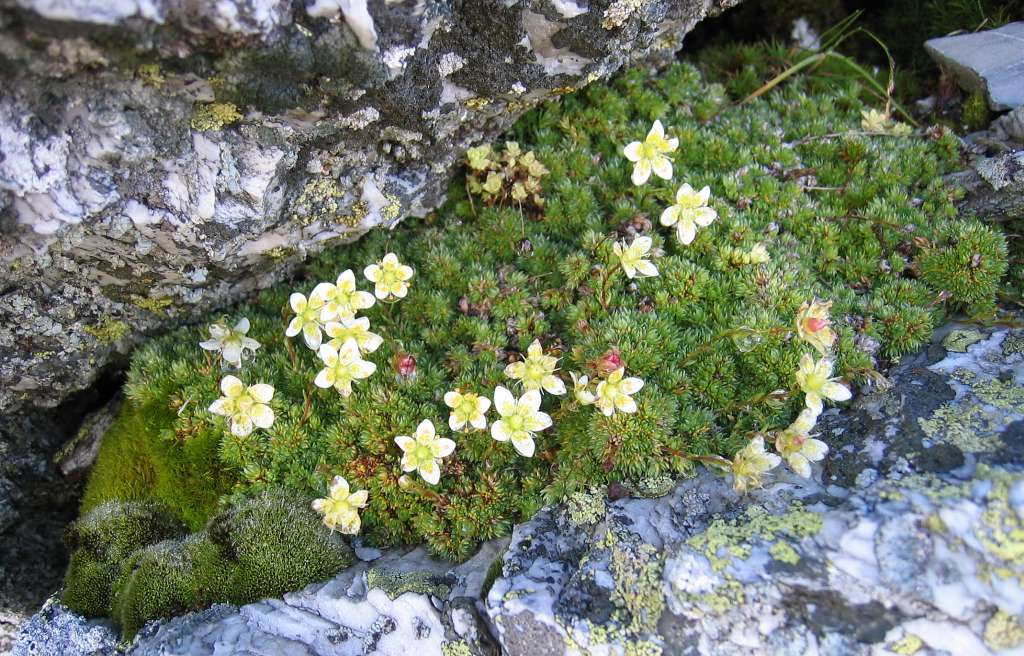 Moos-Steinbrech (Saxifraga bryoides) auf Quarz